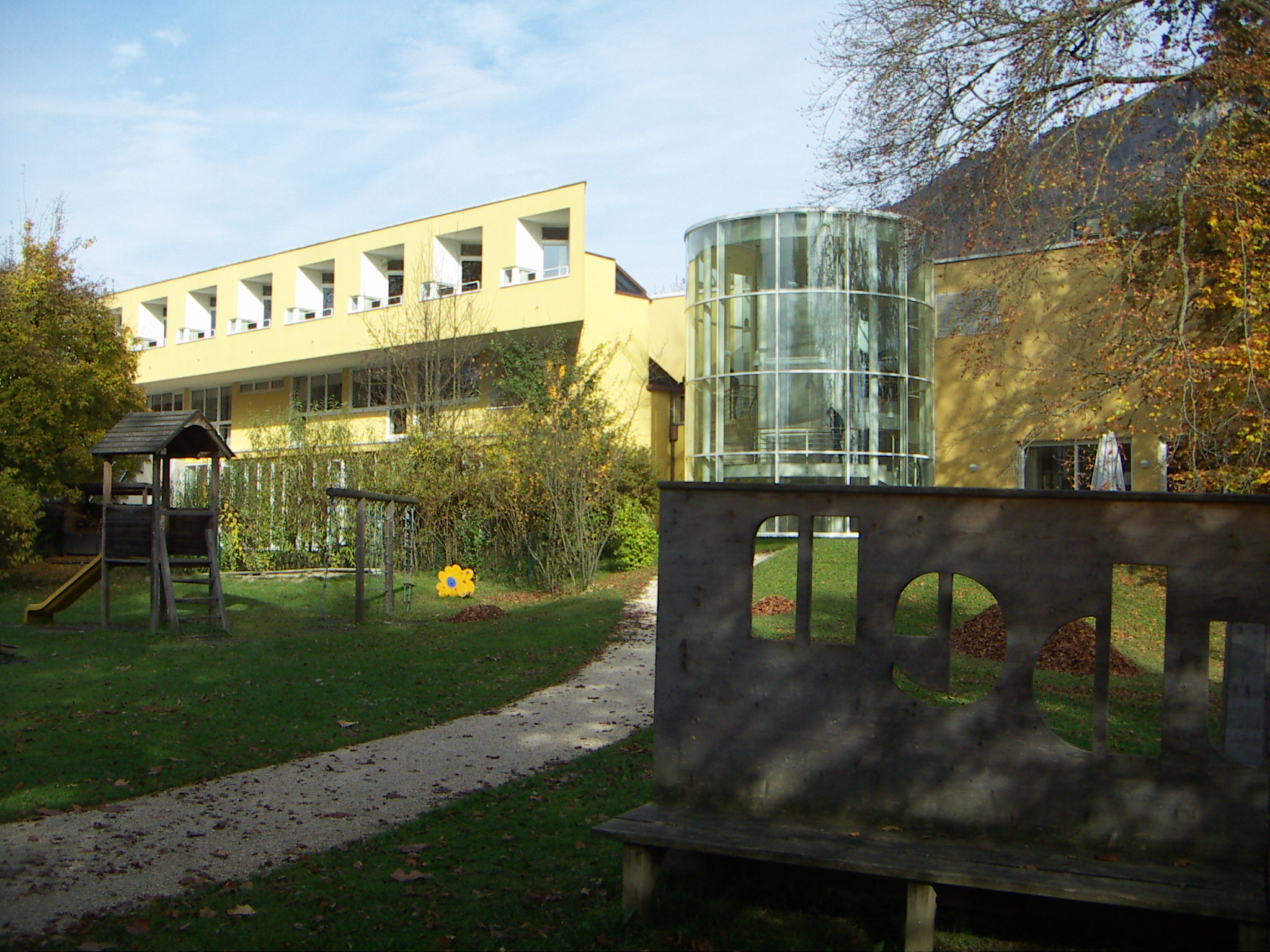 Ansicht vom Bildungshaus Salzburg St. Virgil vom hofseitigen Skulpturenpark aus. Architekt: Wilhelm Holzbauer